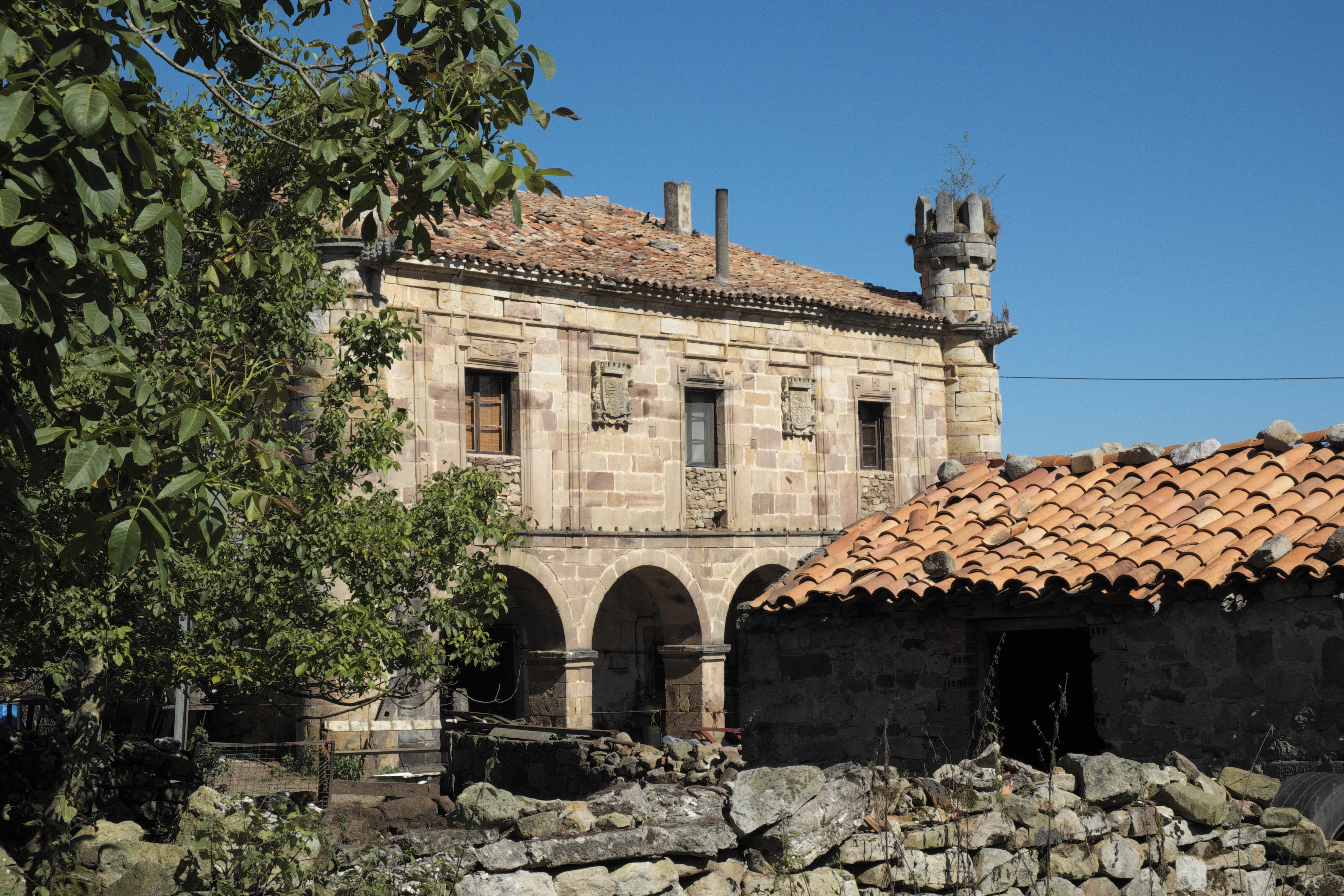 Casona de Ceballos el Caballero in Argomilla de Cayón in der Gemeinde Santa María de Cayón in Kantabrien (Spanien)